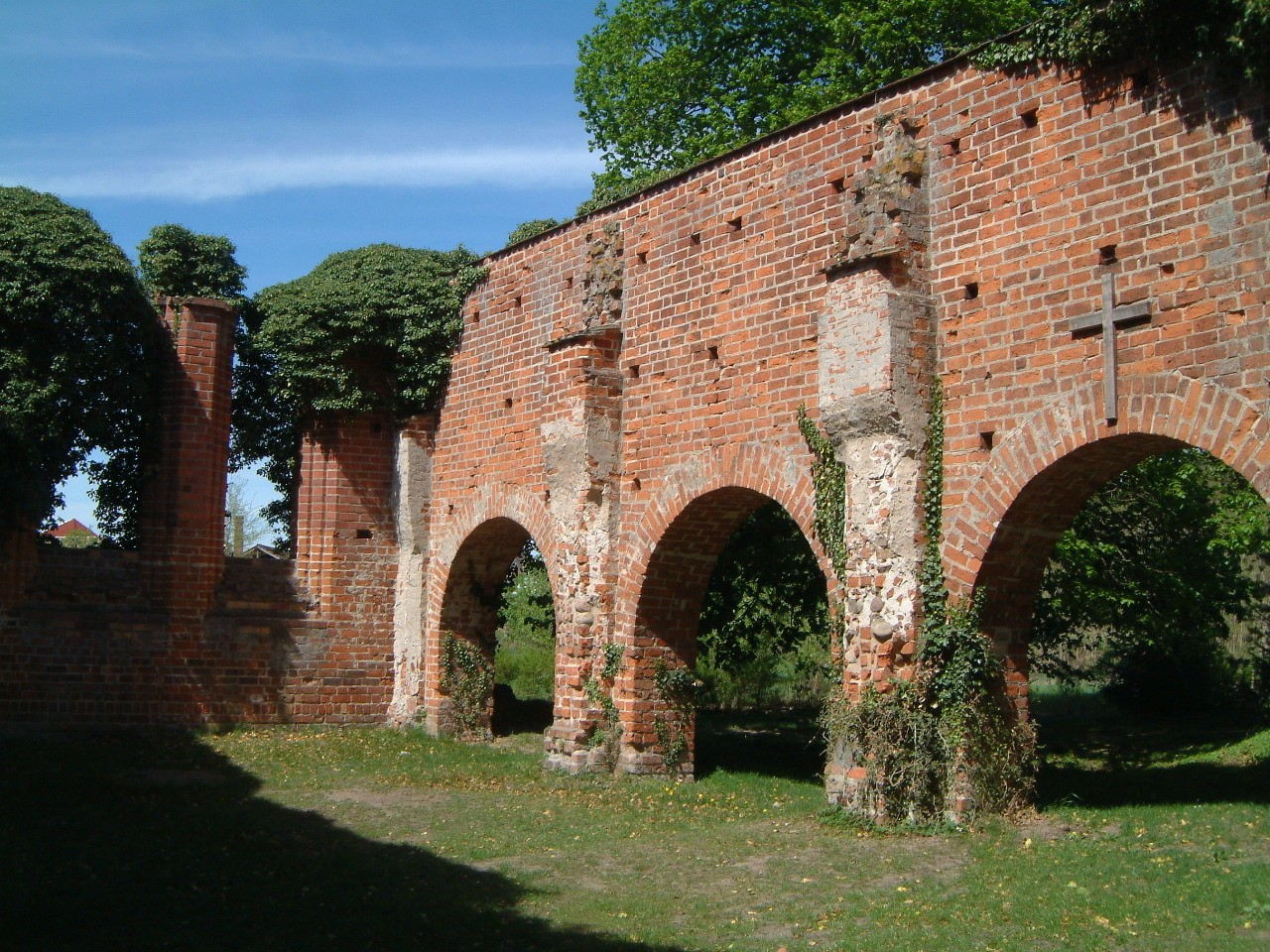 Die Ruinen des Zisterzienserklosters in Himmelpfort (Landkreis Oberhavel, Brandenburg). Backsteinmauer mit unregelmässigem Mauerwerksverband (Wilder Verband).